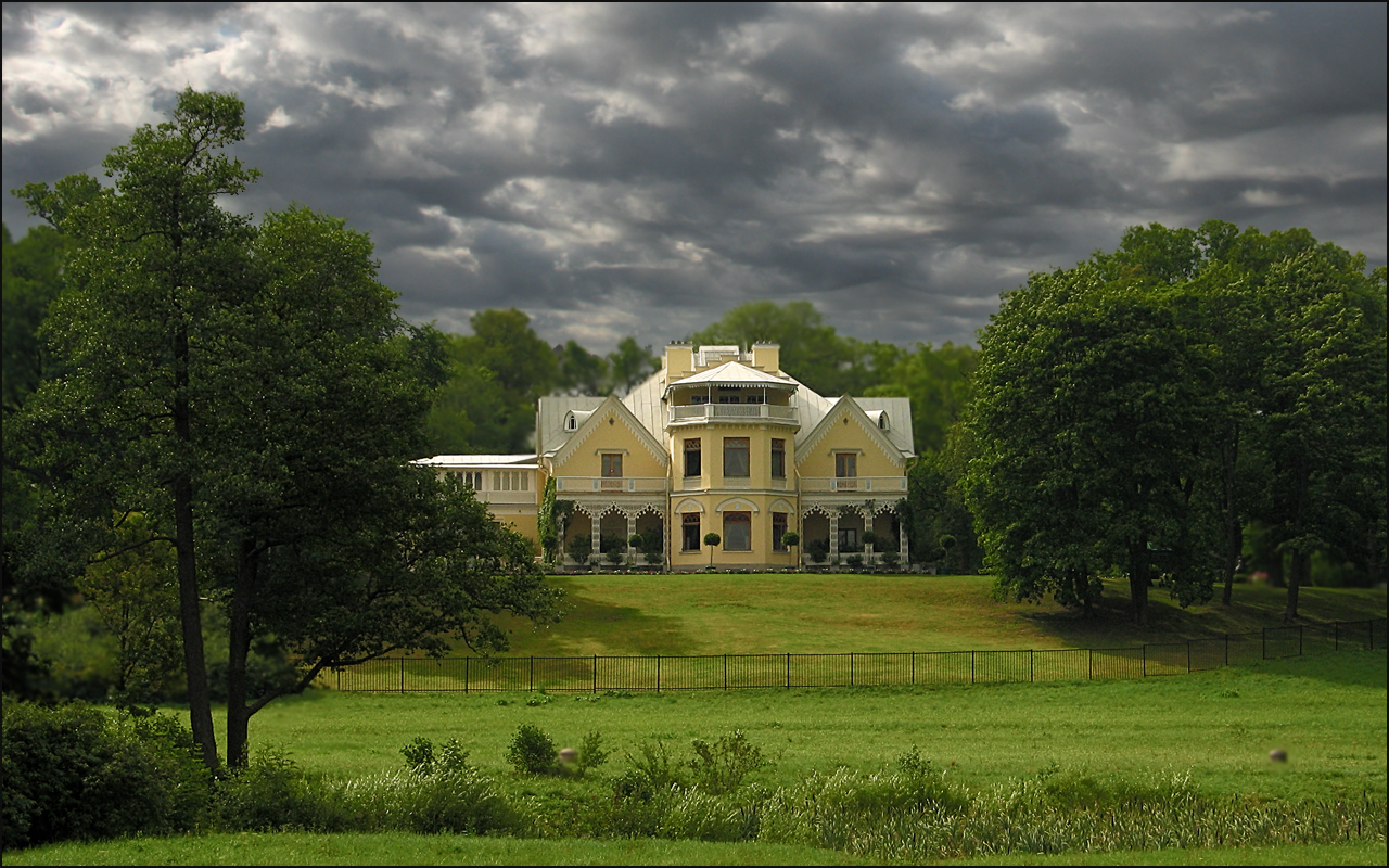 парк Александрия, "коттедж"